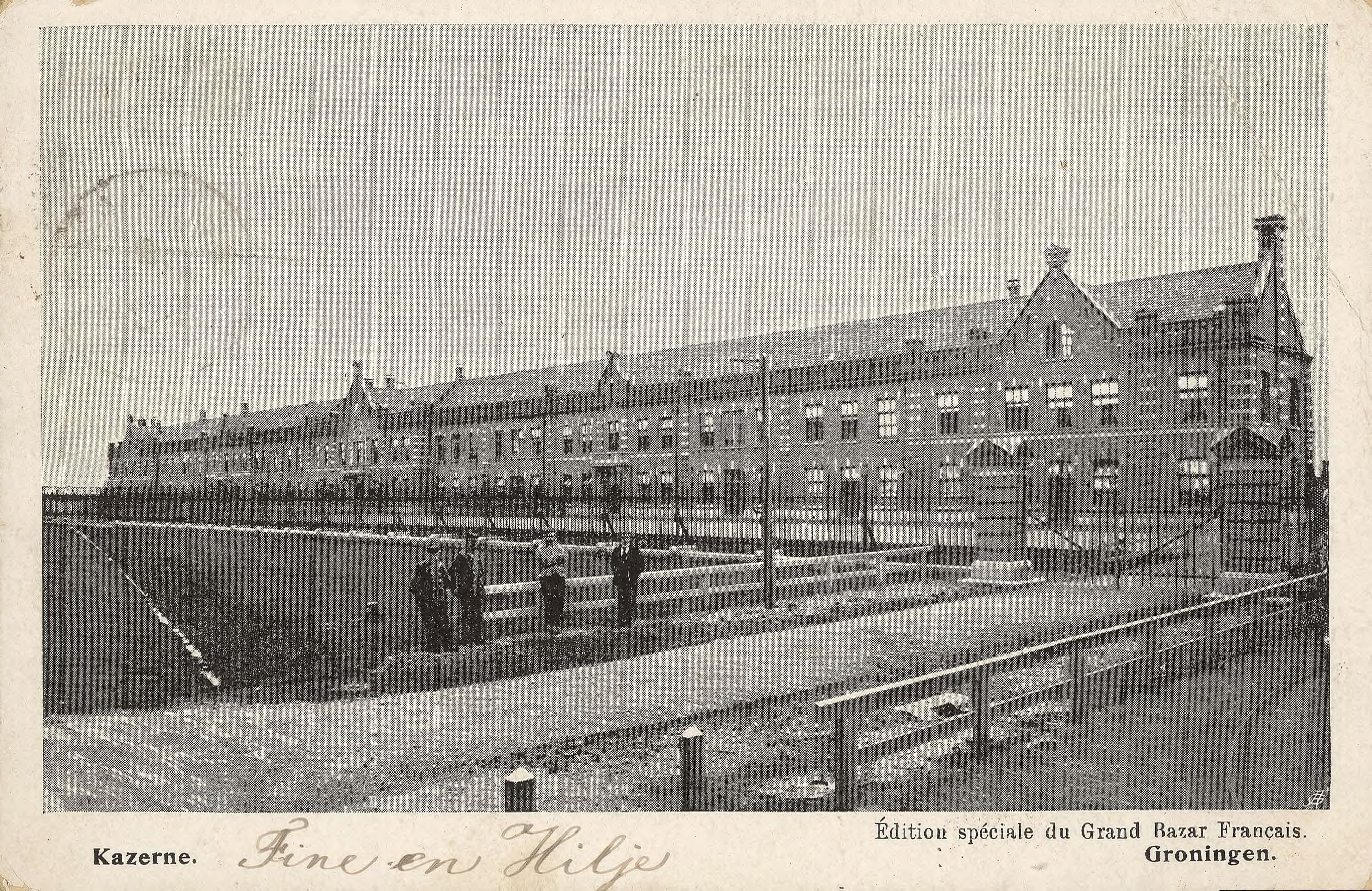 Rabenhauptkazerne rond 1905